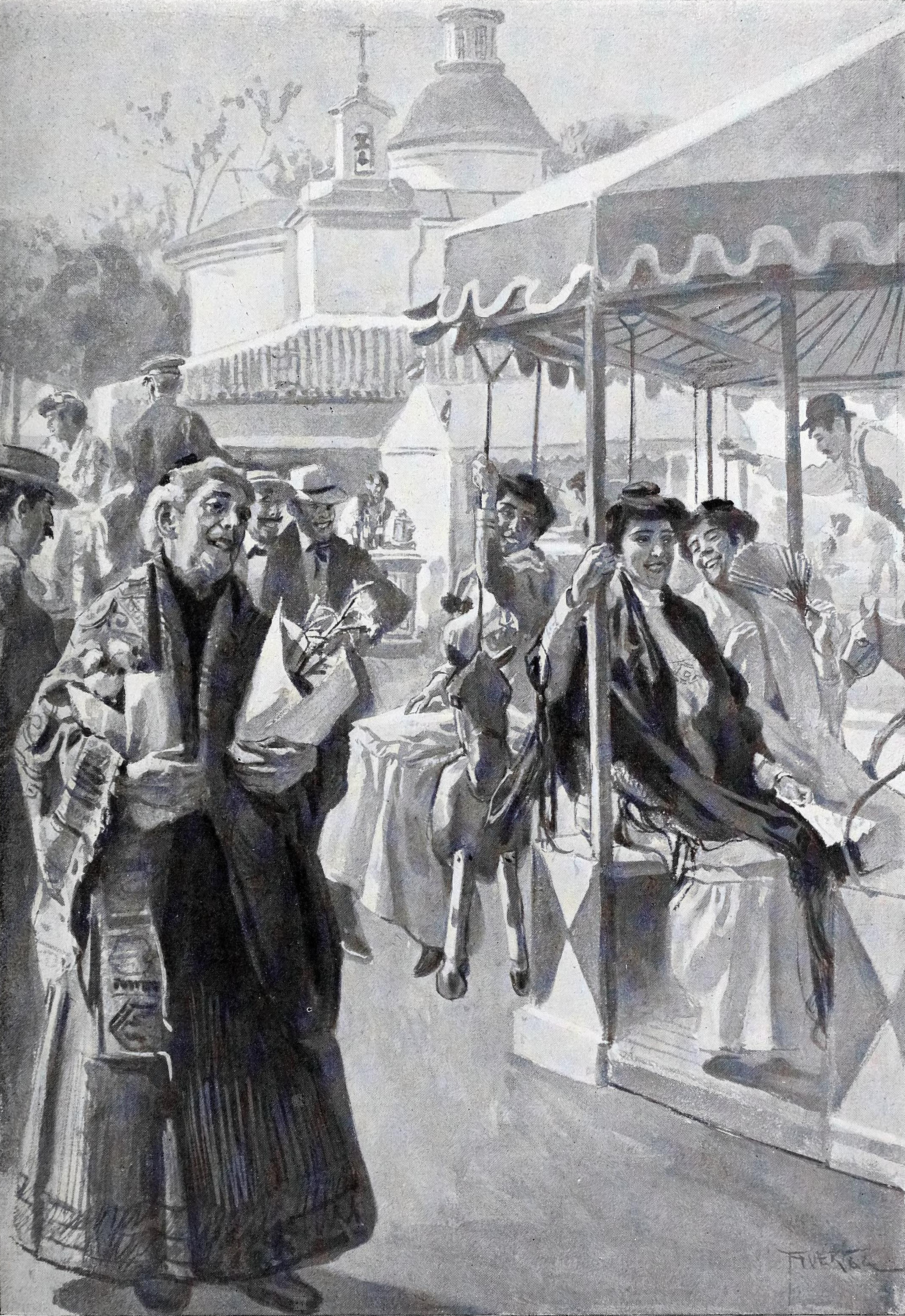 Páginas artísticas. En San Antonio de la Florida.